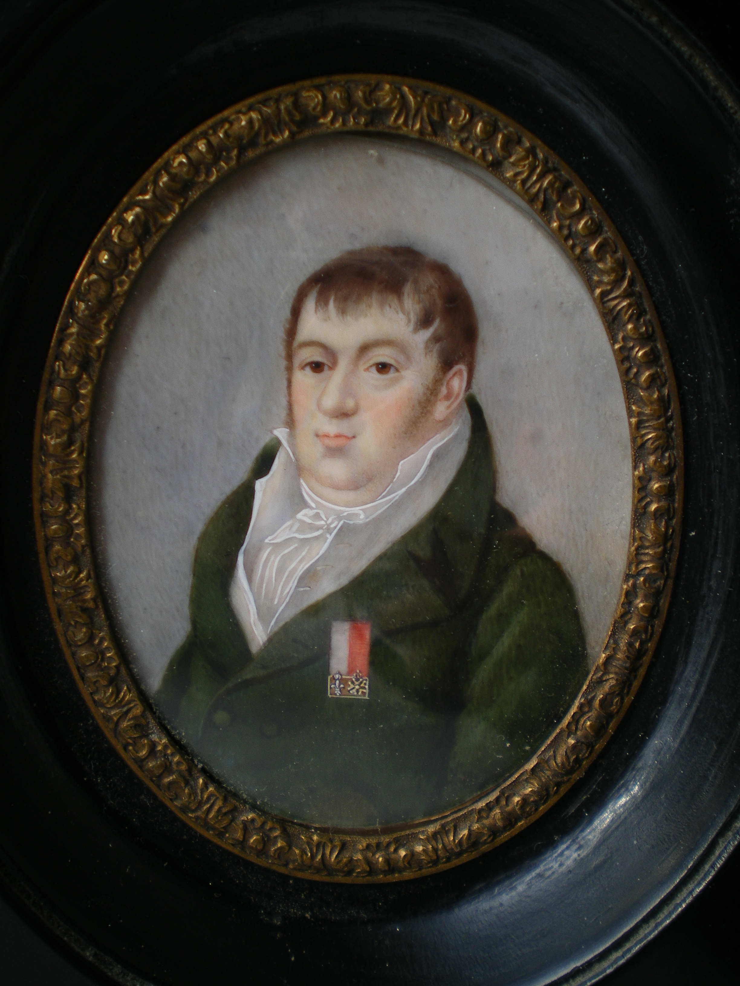 Louis Champy, député en 1820